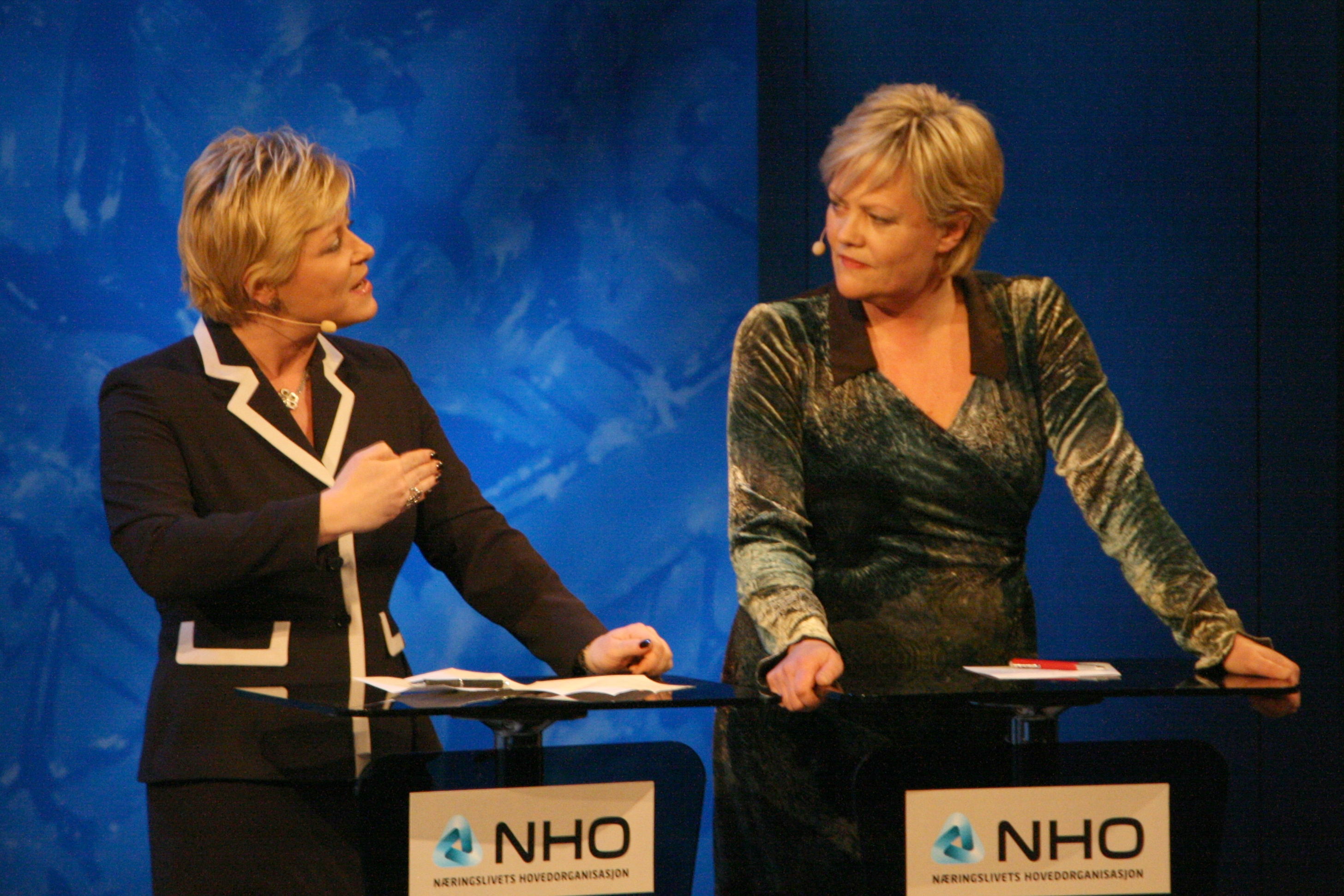 Siv Jensen (Frp) og Kristin Halvorsen (SV). Fra NHOs Årskonferanse 2009.